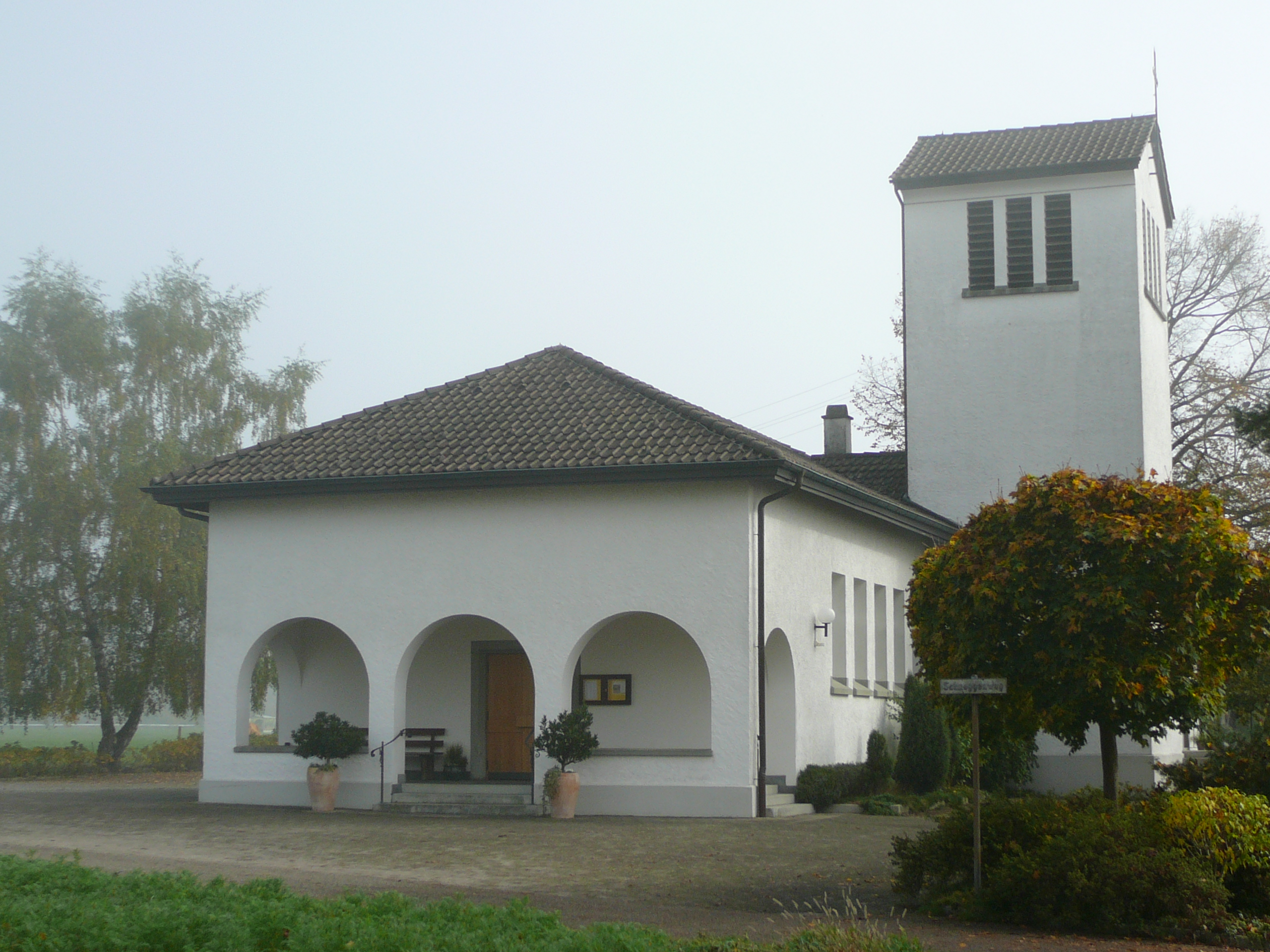 Römisch-katholische Pfarrkirche St. Josef Glattfelden, Ansicht von Westen